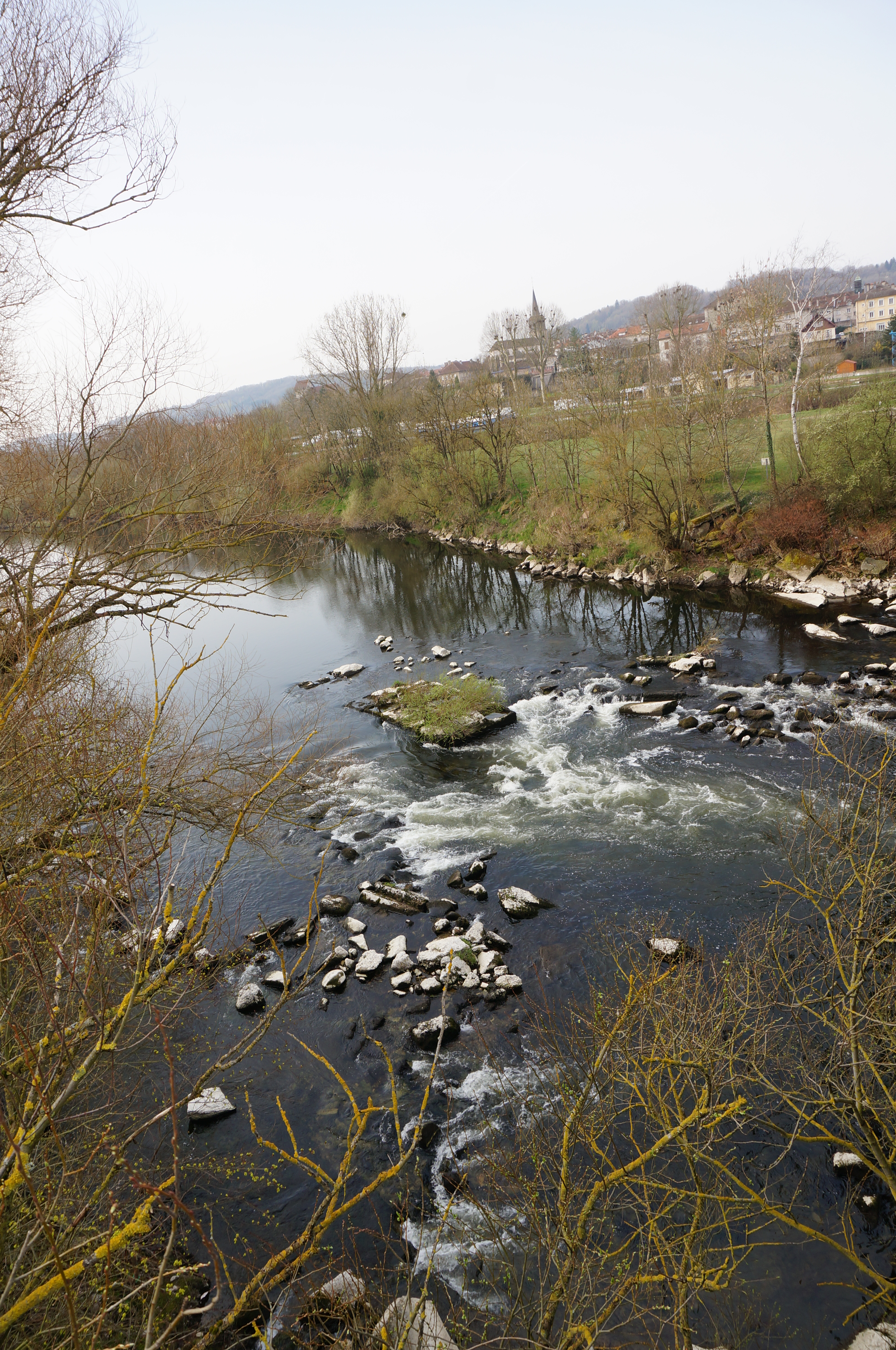 à Charmes (Vosges).